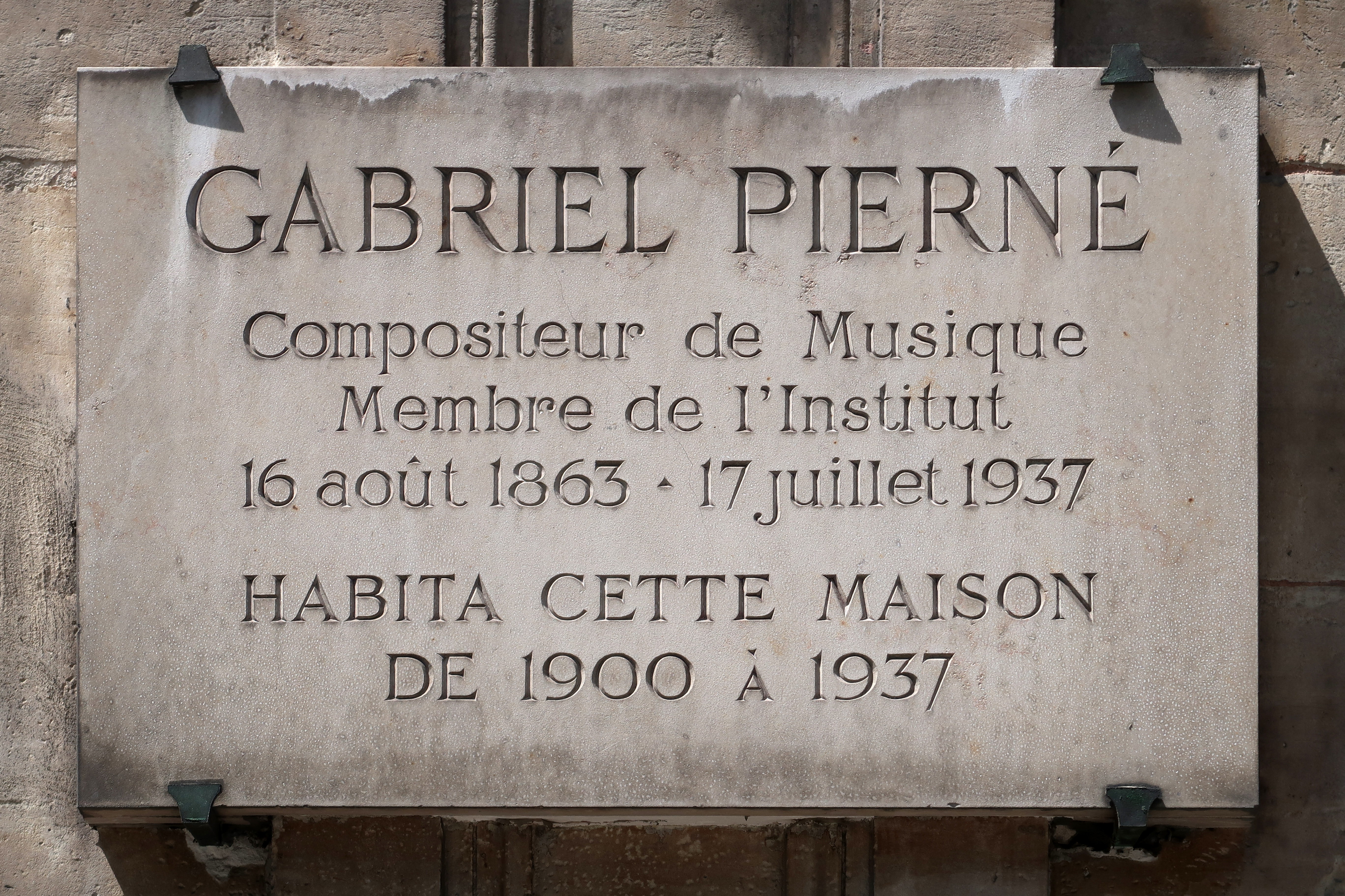 Plaque en hommage au compositeur Gabriel Pierné, 8 rue de Tournon (Paris 6e).